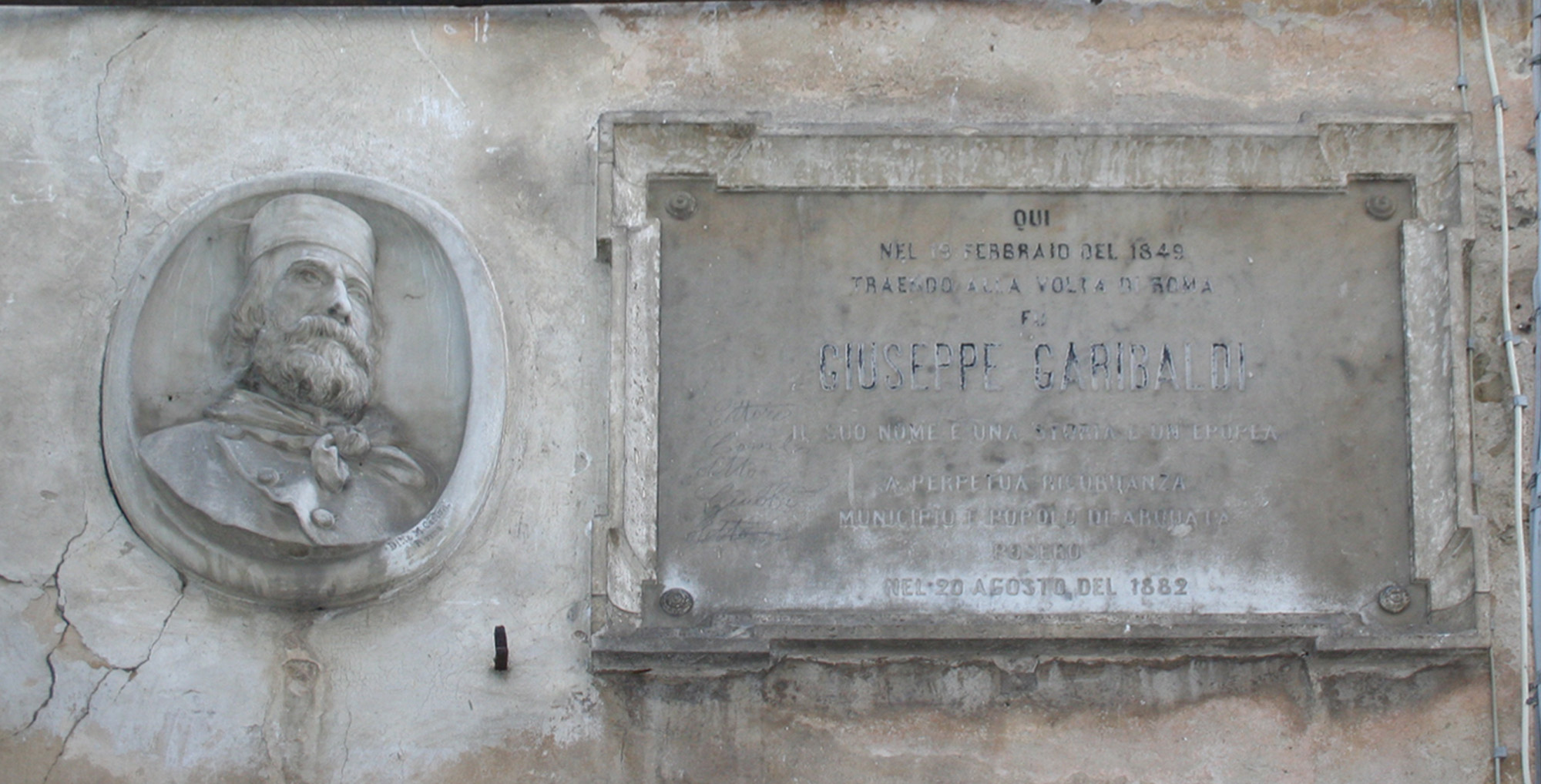 Lapide posta a memoria della sosta di Giuseppe Garibaldi presso Arquata del Tronto (Ascoli Piceno)